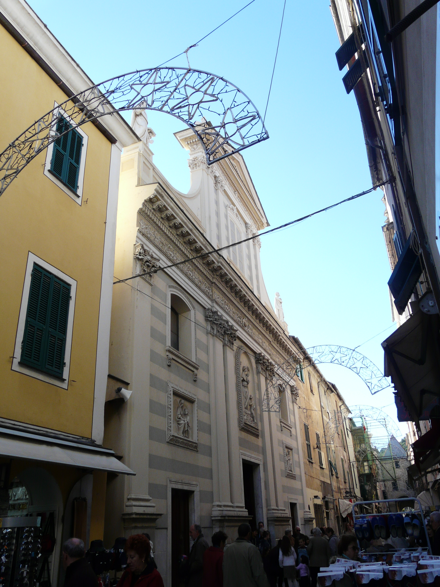 Chiesa di San Matteo, Borghetto Santo Spirito, Liguria, Italia